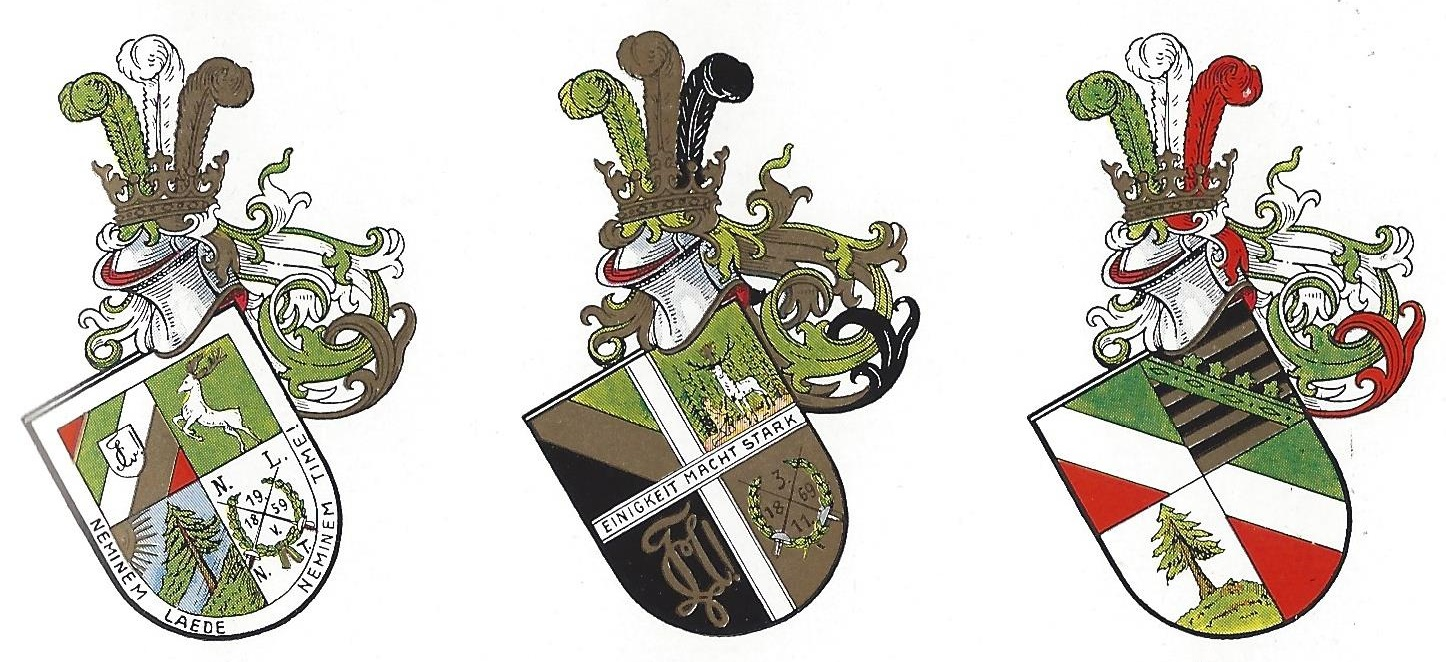 Studentenwappen der Corps Silvania, Hubertia und Saxonia zu Tharandt.